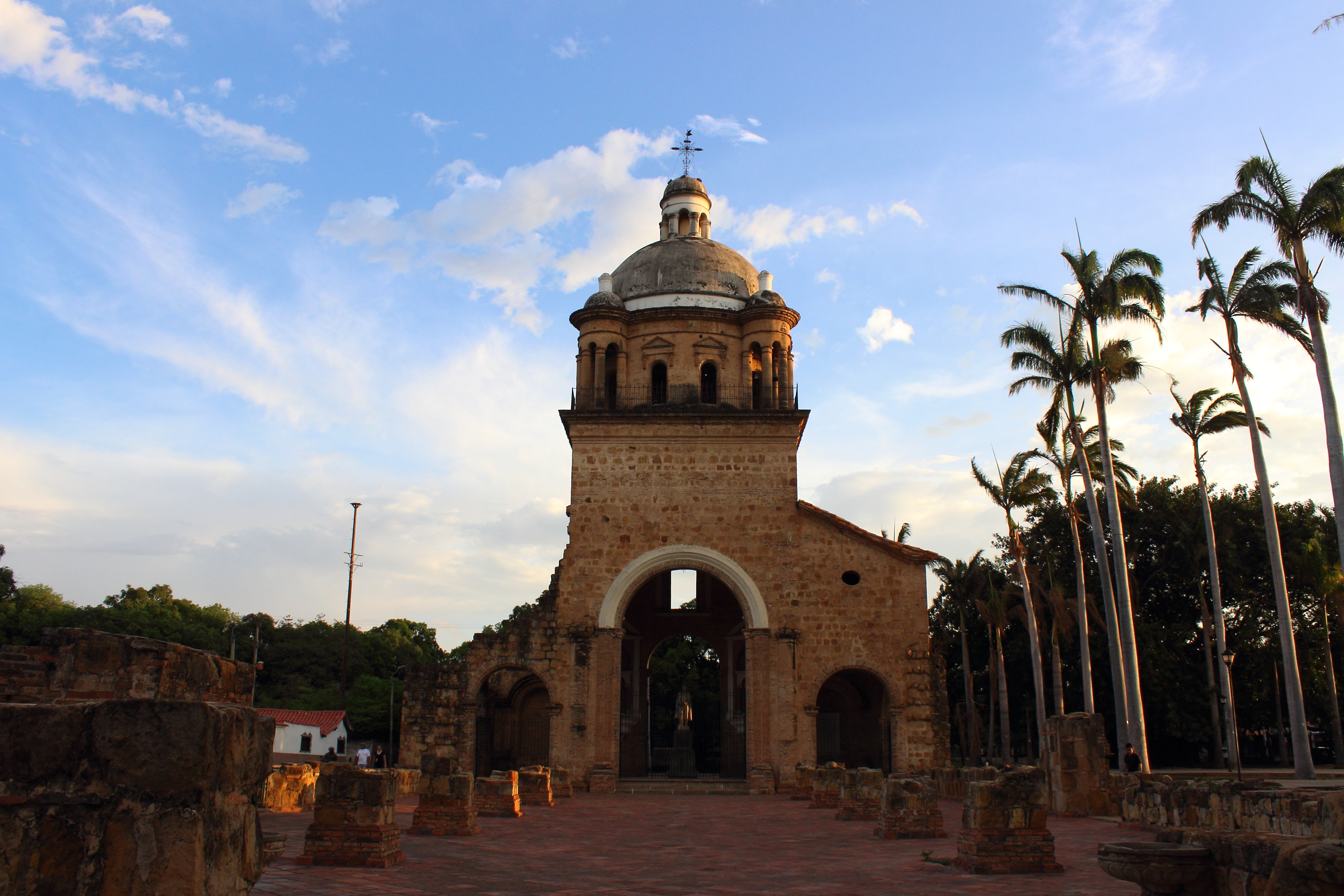 Templo Histórico de Cúcuta, Ubicado en el parque Gran Colombiano donde también esta ubicada la casa Museo Casa Natal del General Santander